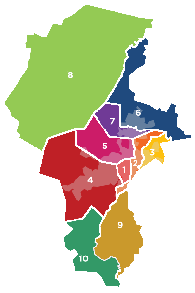 Parroquias del municipio Iribarren N° Parroquia 1 Concepción 2 Catedral 3 Santa Rosa 4 Juan de Villegas 5 Unión 6 Tamaca 7 El Cují 8 Aguedo F. Alvarado 9 Juárez 10 Buena Vista